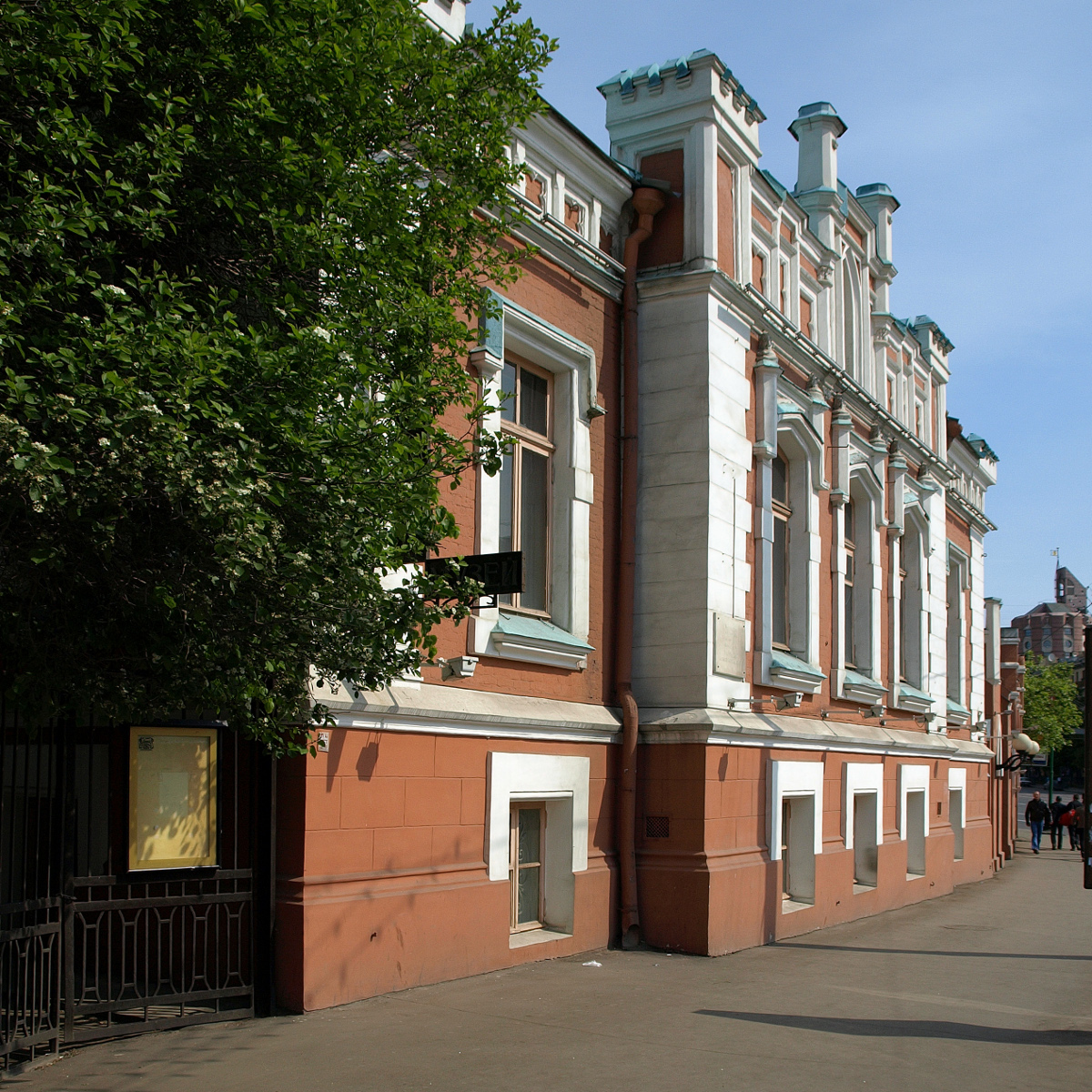 Зацепский вал - театральный музей им. Бахрушина, Москва.